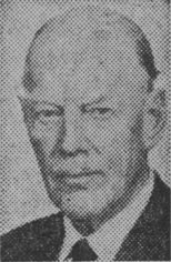 Birger Borgström